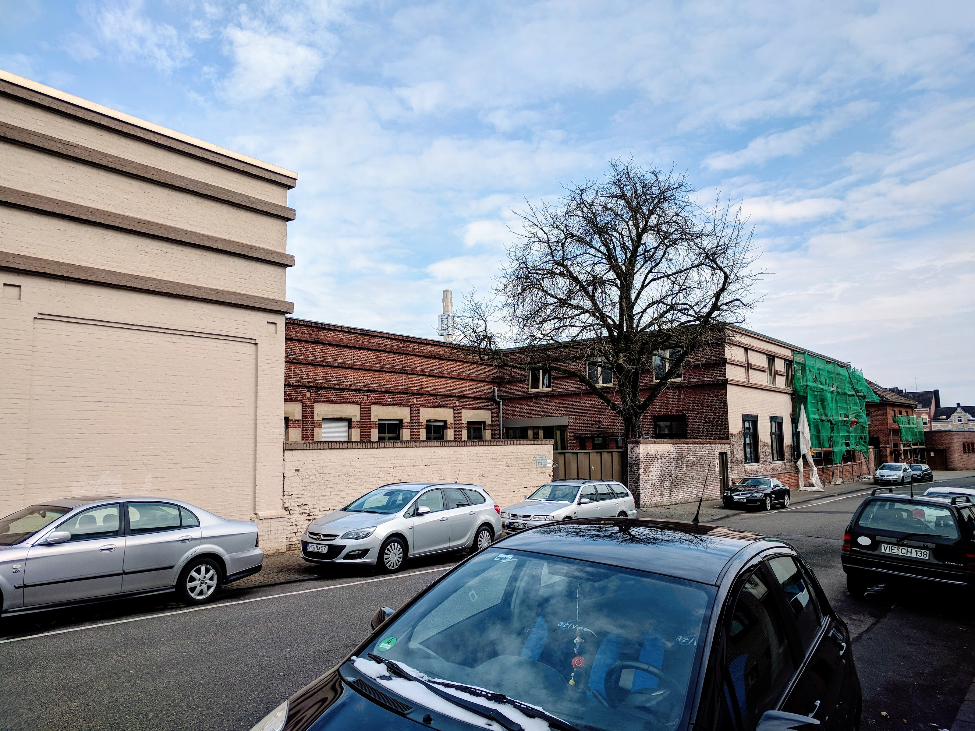 Tuchfabrik Schmitz ehemals Tuchfabrik Aschaffenburg. Erbaut 1923 nach einem Entwurf von Otto Bartning.